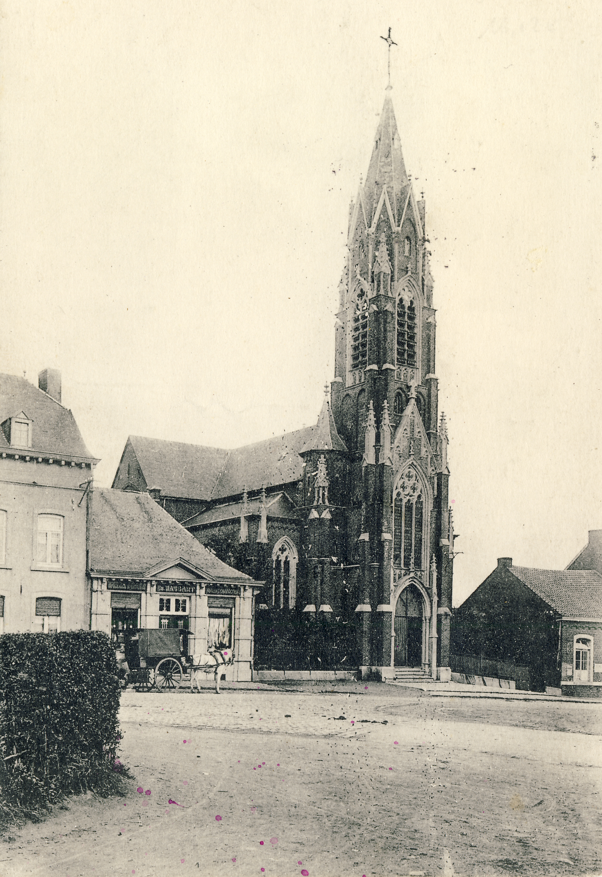 ancienne église d'Ayeneux détruite pendant la guerre 14-18